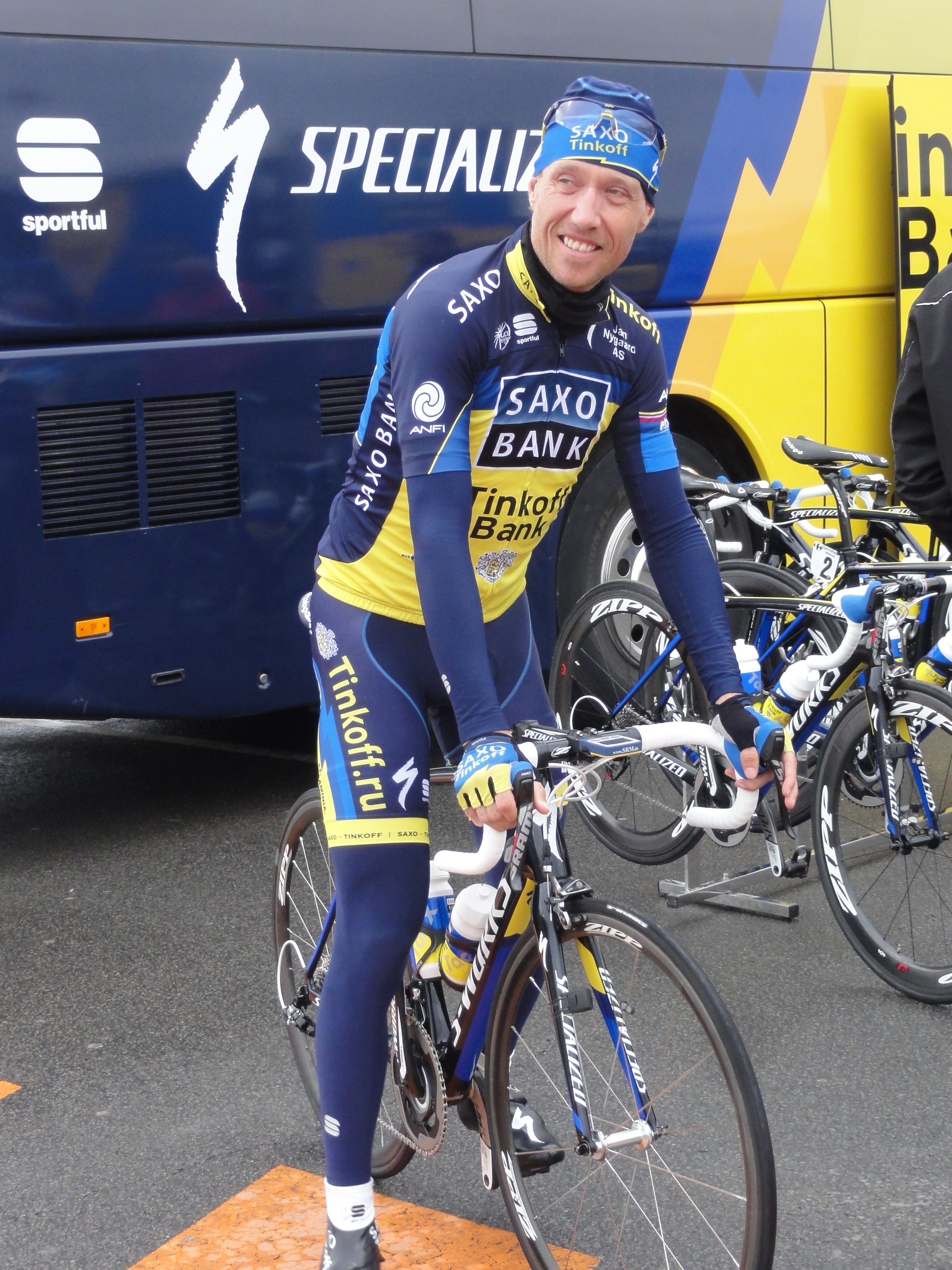 Reportage photographique réalisé le mardi 11 avril 2013 durant l'édition 2013 du Grand Prix de Denain à Denain, Nord, Nord-Pas-de-Calais, France. Depicted person: Nicki Sørensen